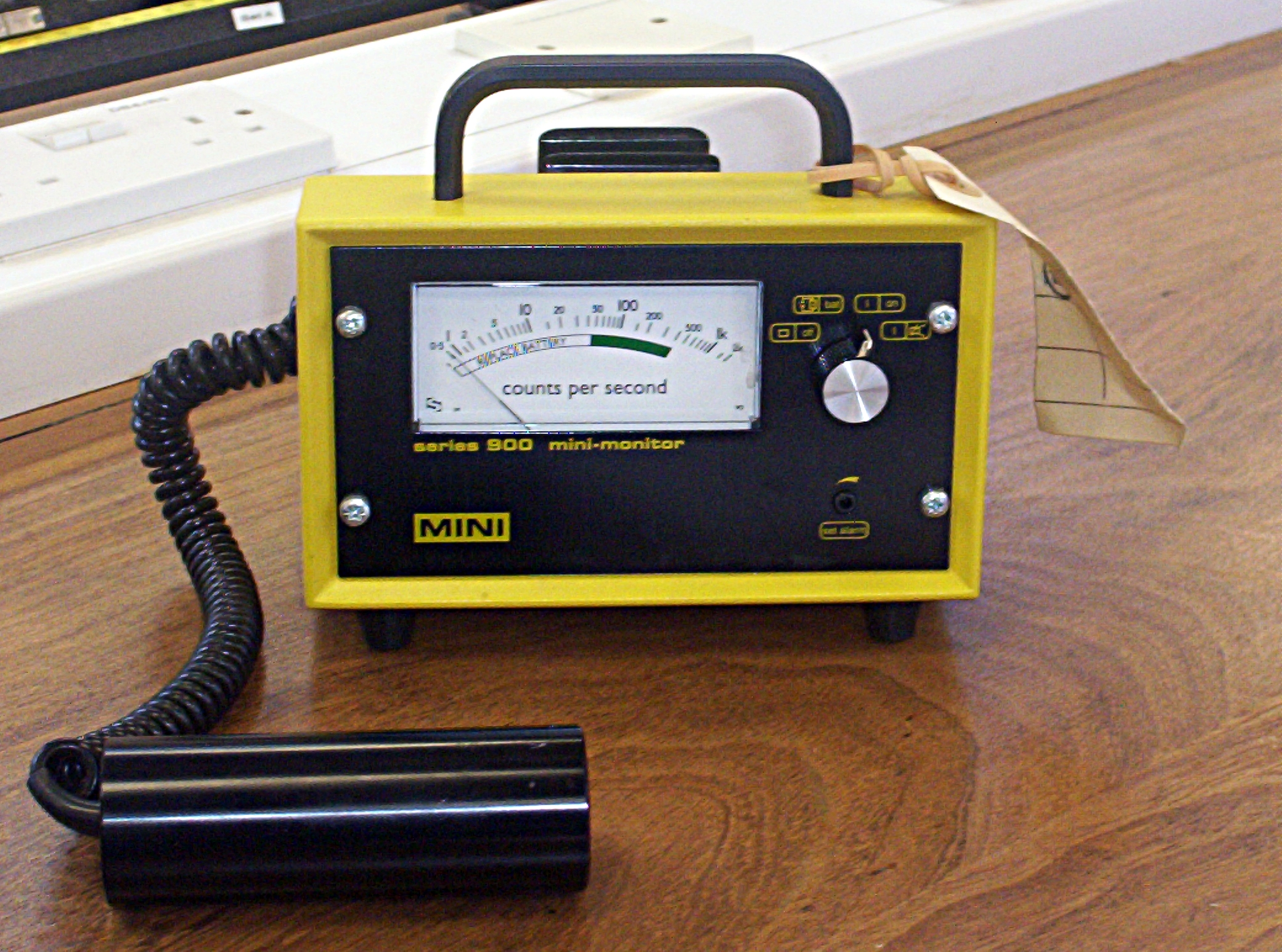 Geiger-Müller radiation detector.